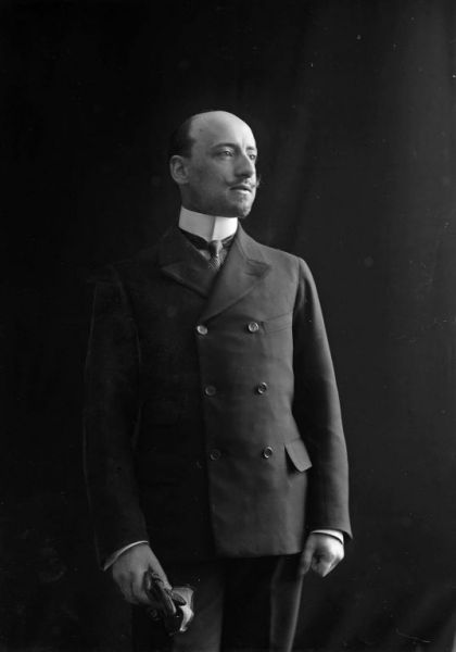 foto del principe di Montevevoso gabriele d'Annunzio